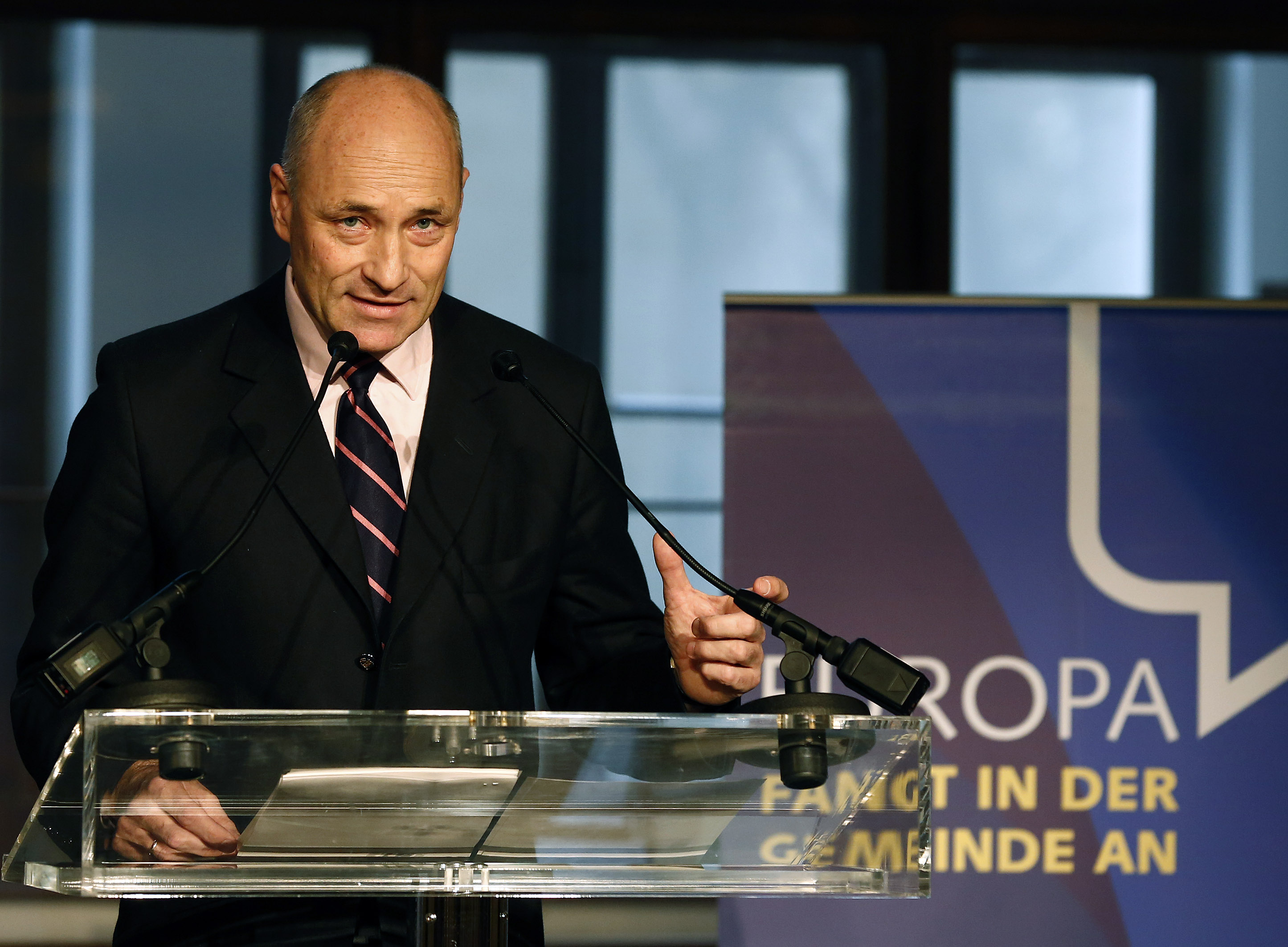 Zweite Generalversammlung der EuropagemeinderätInnen. Martin Weiss, Leiter der Presse- und Informationsabteilung des Außenministeriums, Palais Niederösterreich, Wien, 17.12.2012, Foto: Dragan Tatic